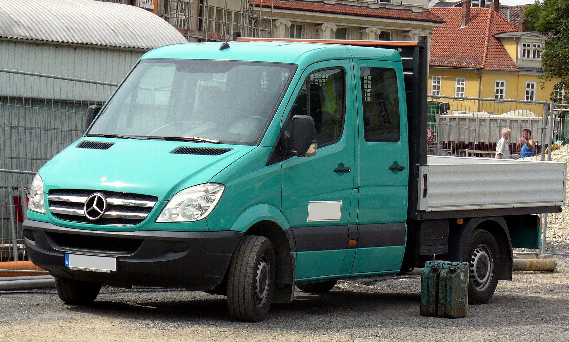 Mercedes-Benz Sprinter Double Cab